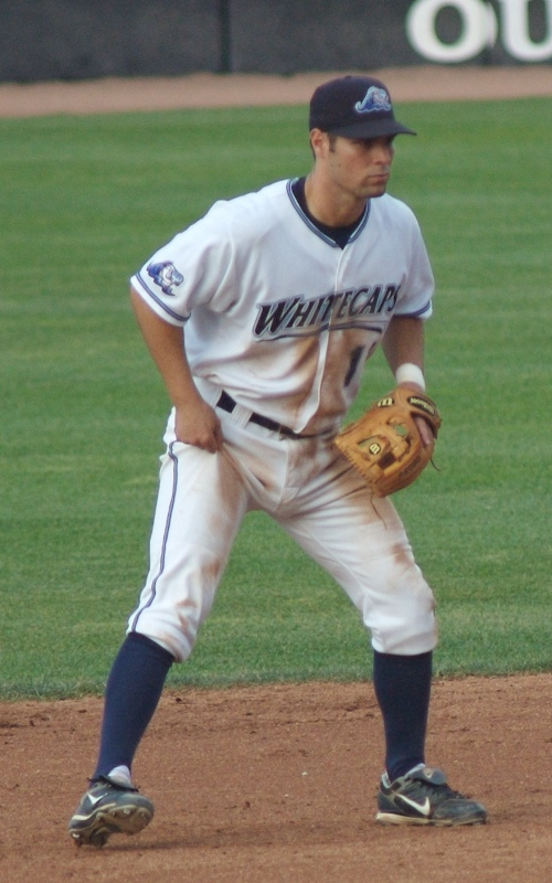 Scott Sizemore